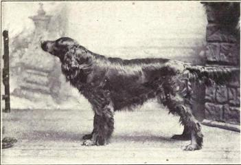 Gordon Setter from 1915